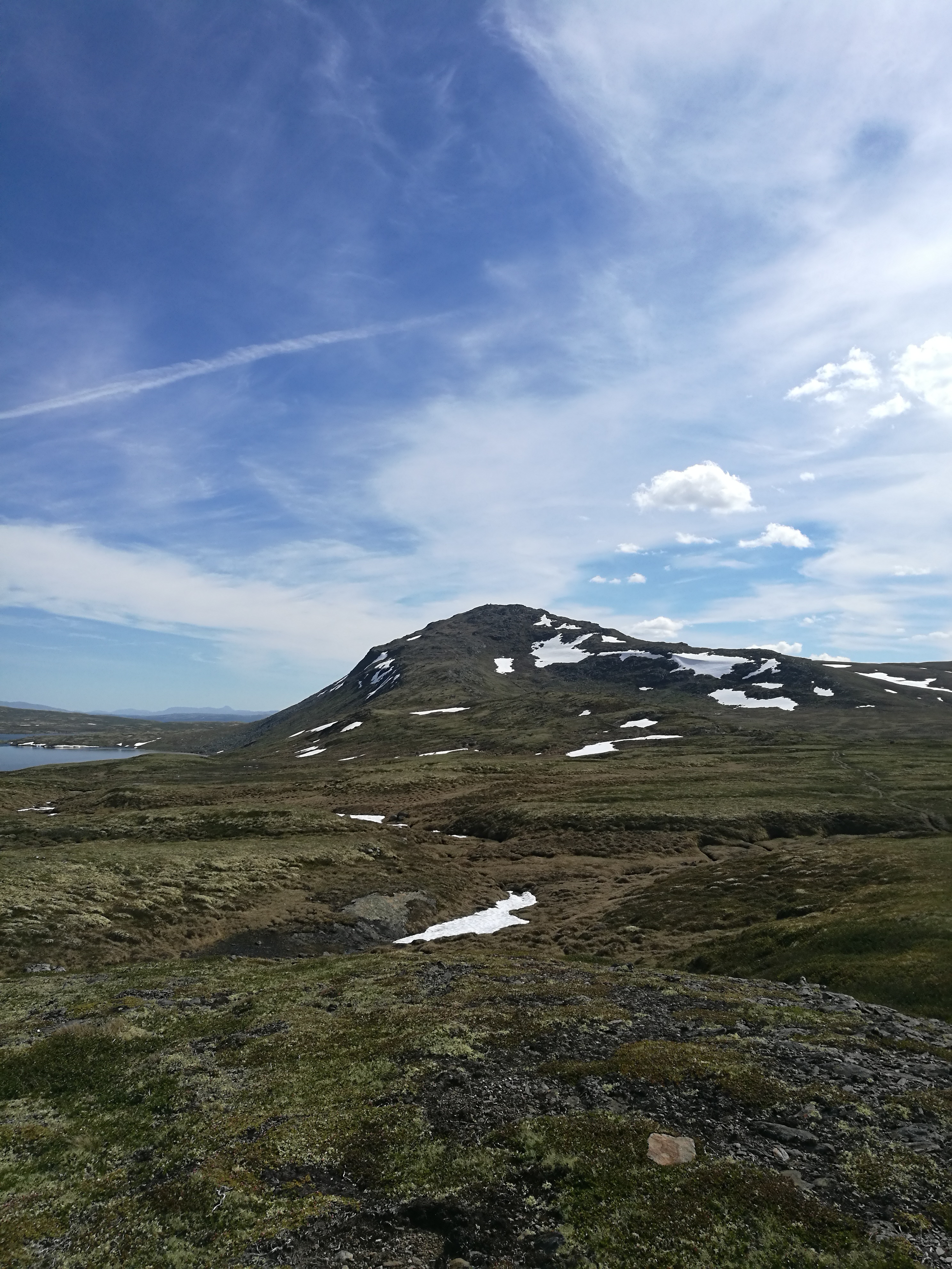 Forollhogna sett fra Buløpet sørøst fra Storsalen.